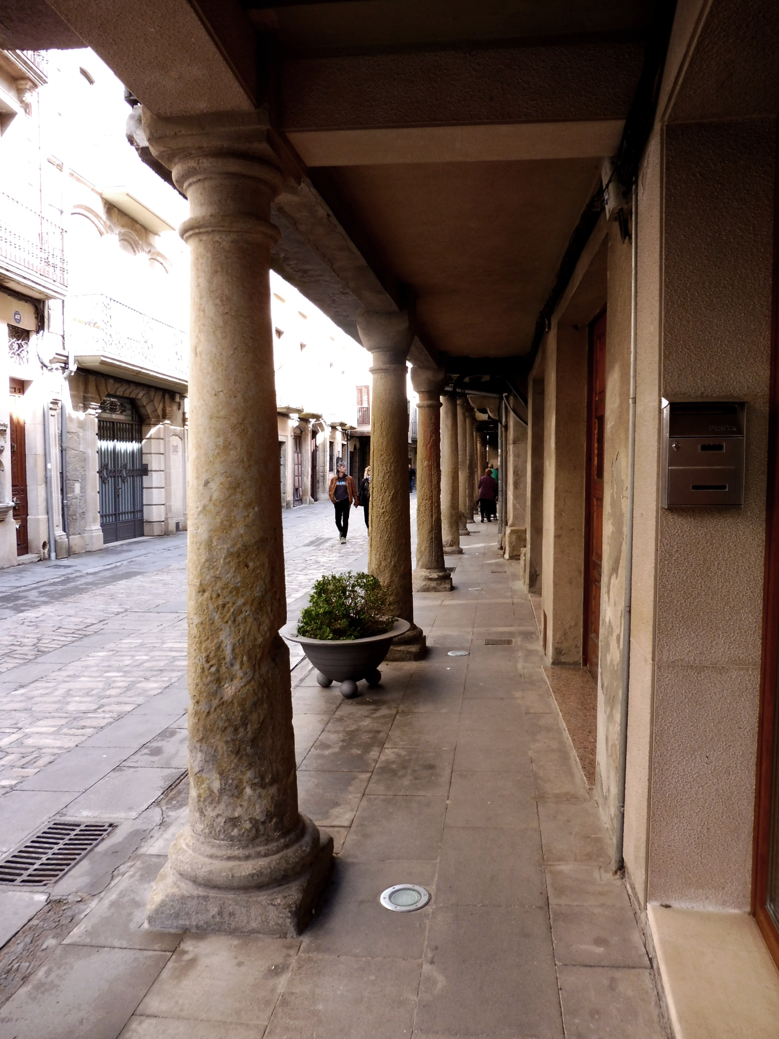 Porxos al carrer Major (Cervera)